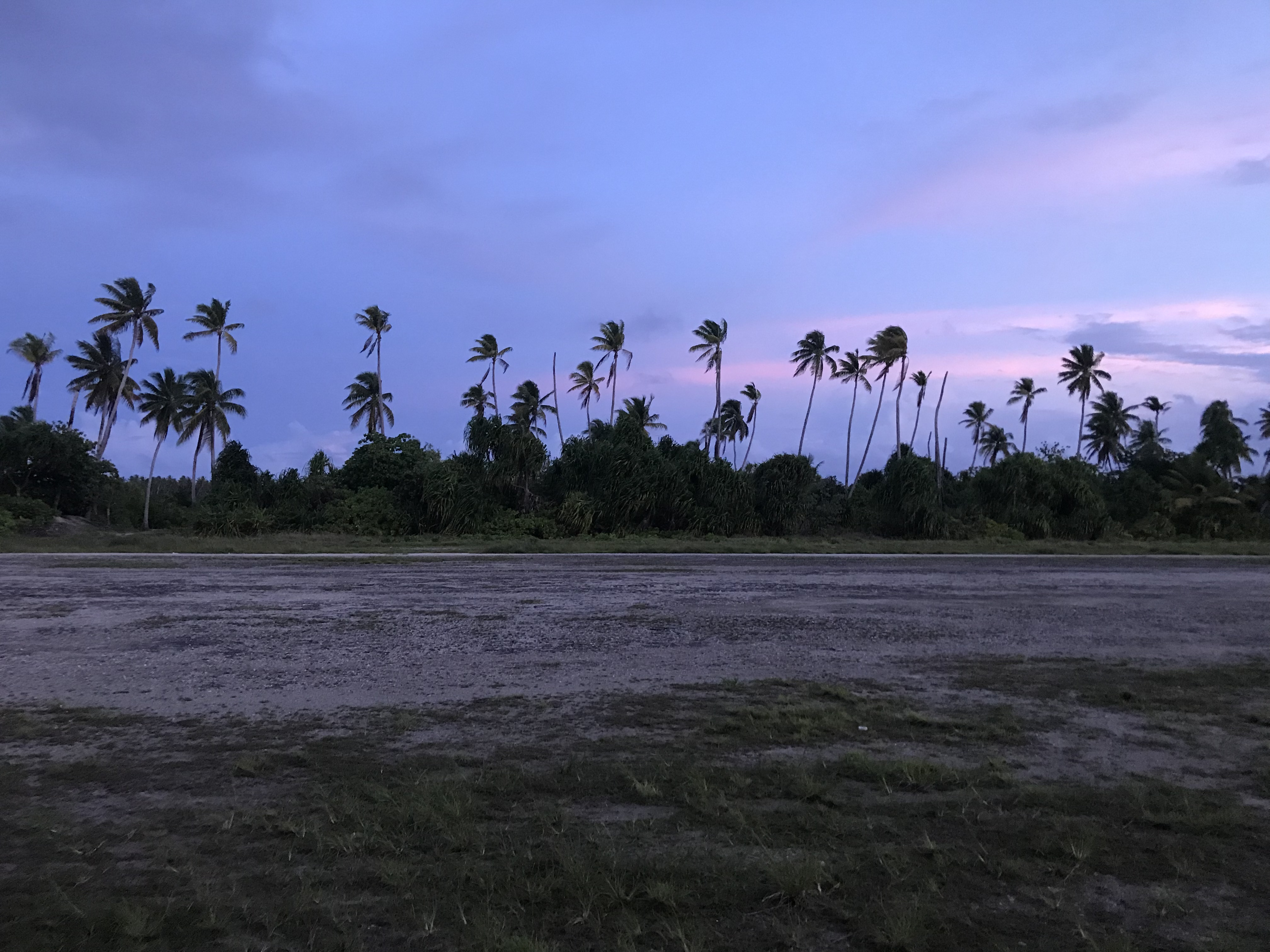 Piste en sable et coraux de l’aerodrome de Makin, nord des îles Kiribati